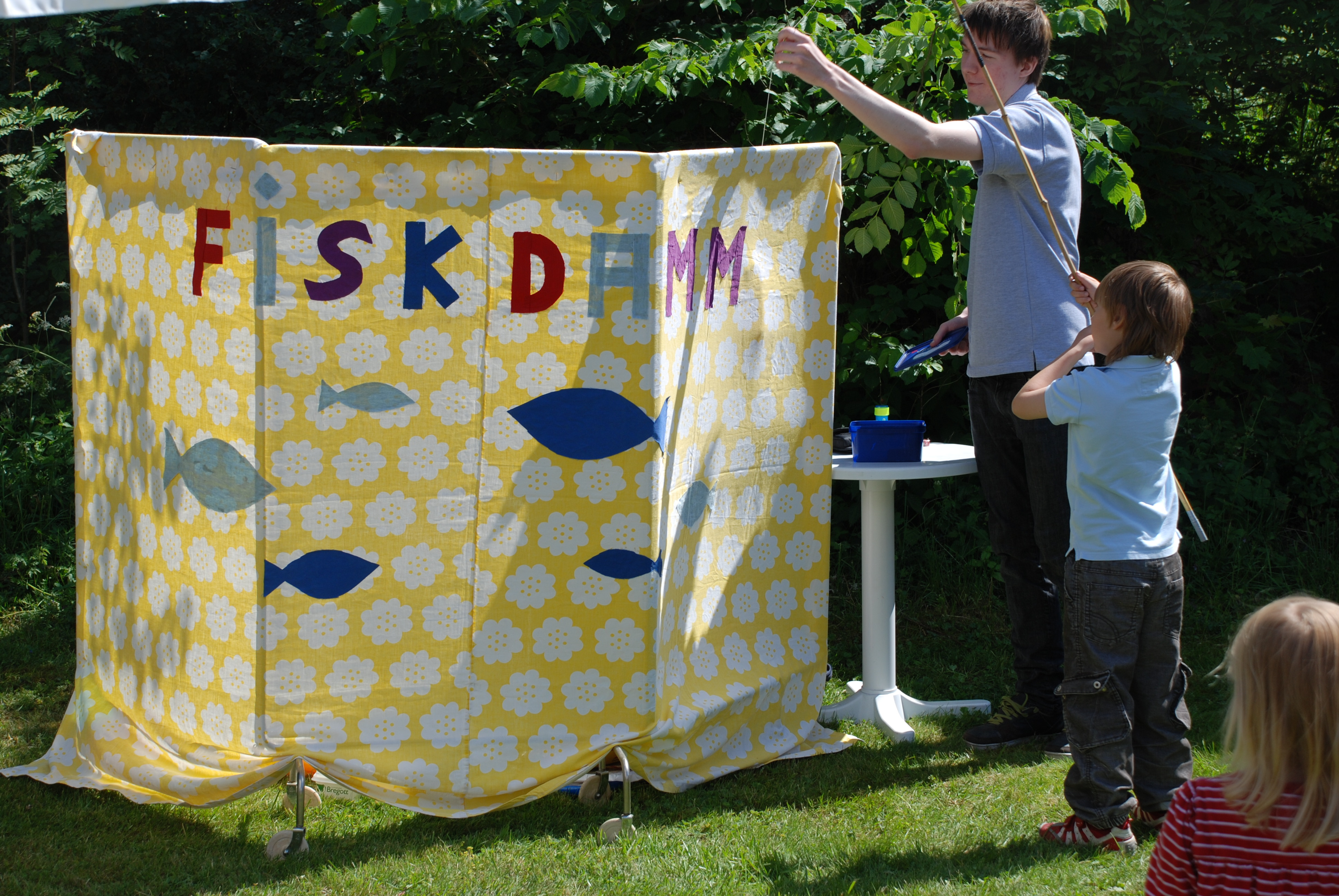 Fiskdamm (midsommarfirande i Edsbro)